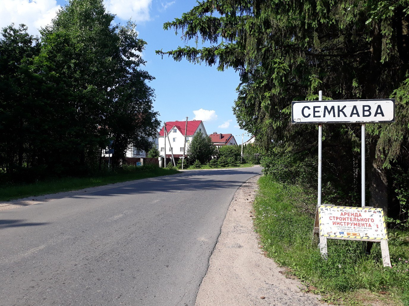 вёска ў траўне 2018